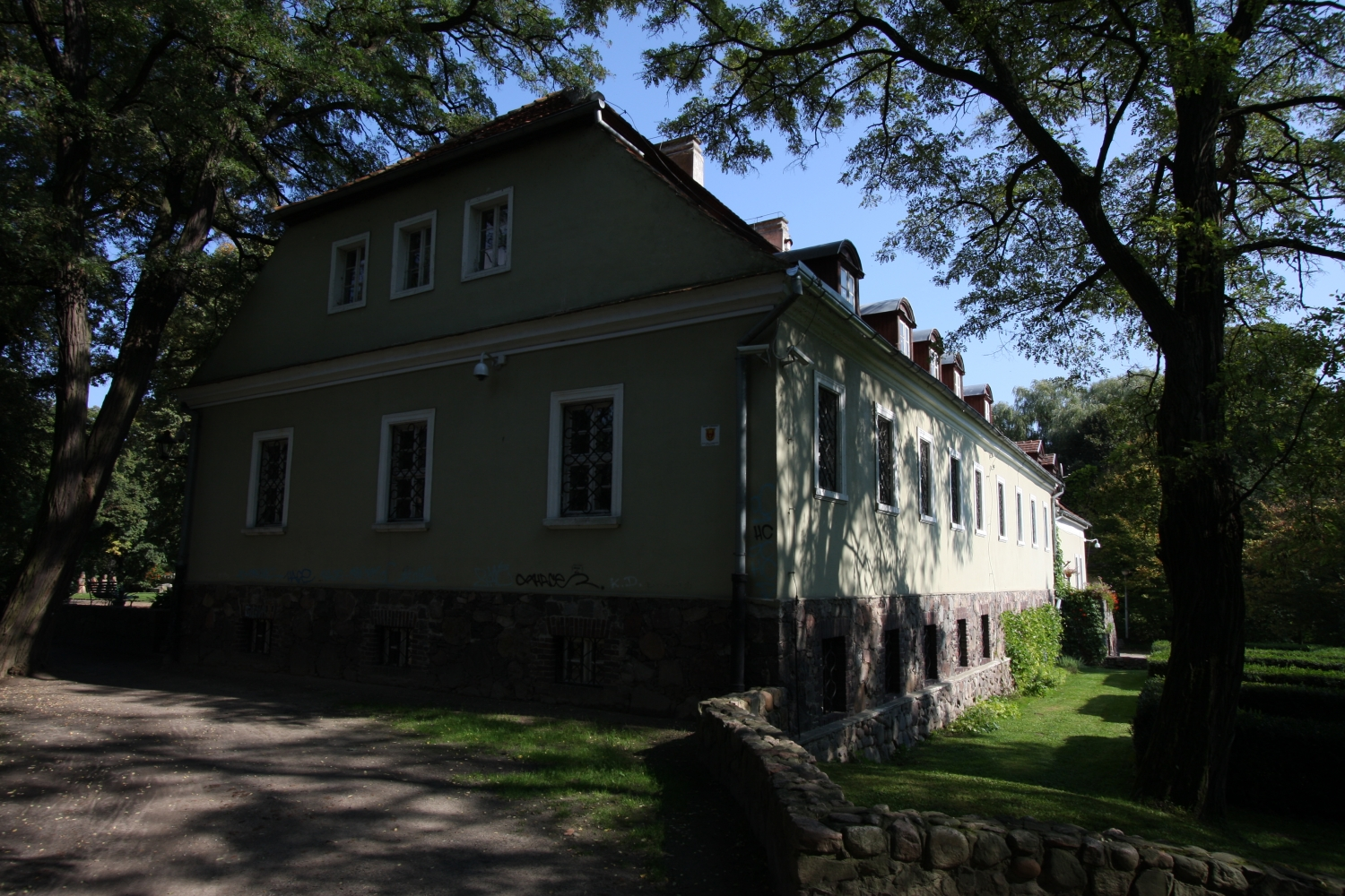 Międzyrzecz, starostwo, w zespole zamkowym, mur., 1719 (zabytek nr 2136 z 8.05.1971; 256 z 04.06.1979)